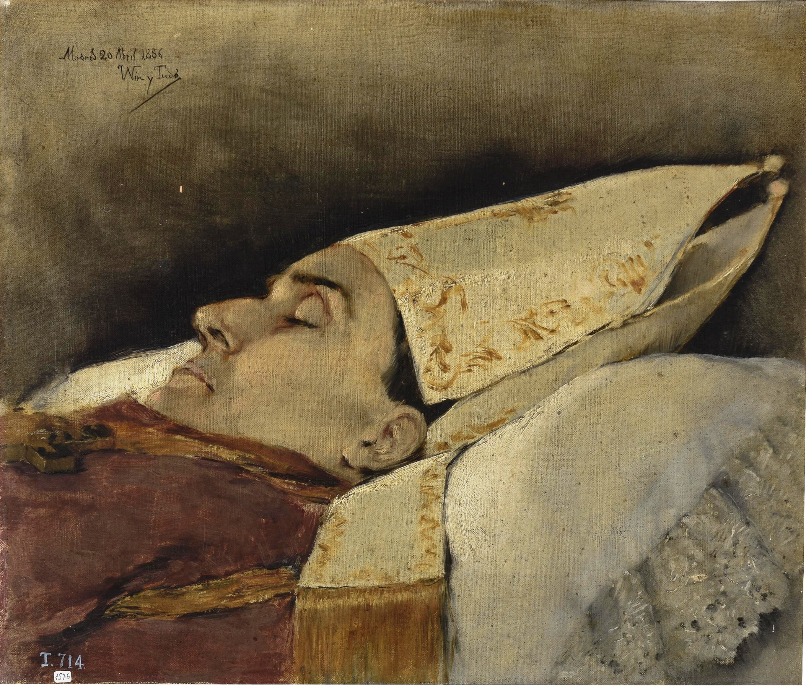 Retrato mortuorio del prelado español Narciso Martínez Izquierdo (1830-1886), que fue el primer obispo de la diócesis de Madrid y murió asesinado por el perturbado sacerdote Cayetano Galeote.